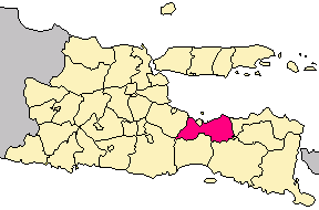 carte indonésienne